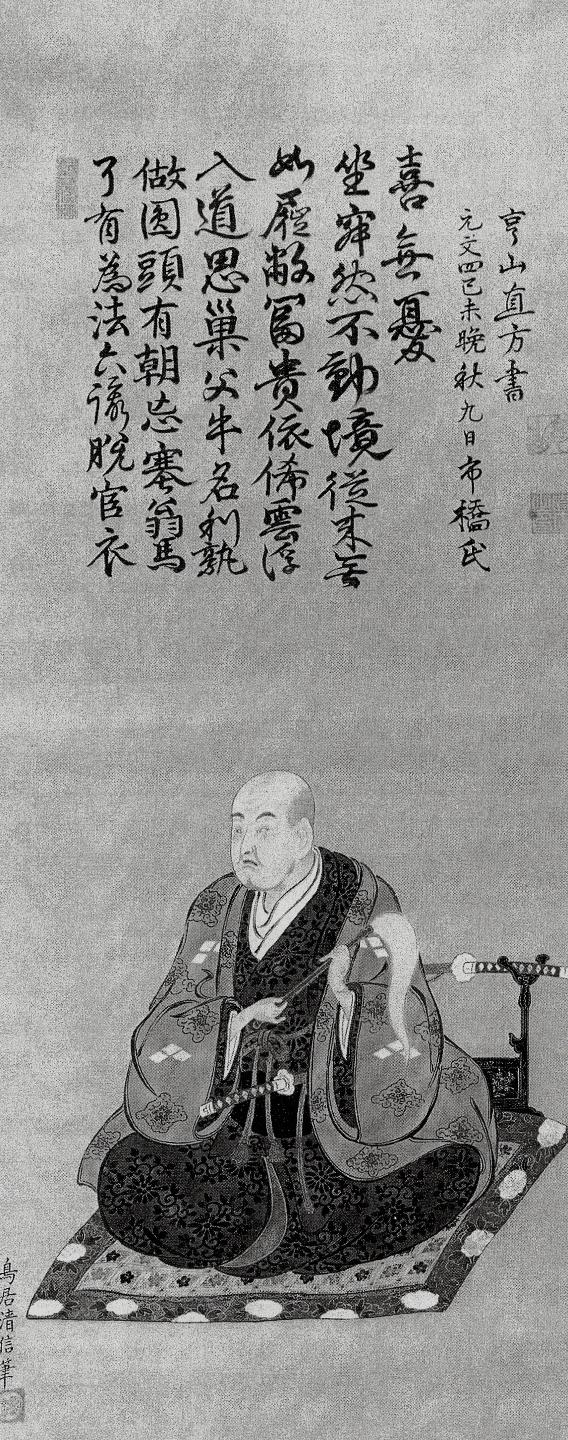 近江仁正寺藩4代藩主・市橋直方の肖像画。